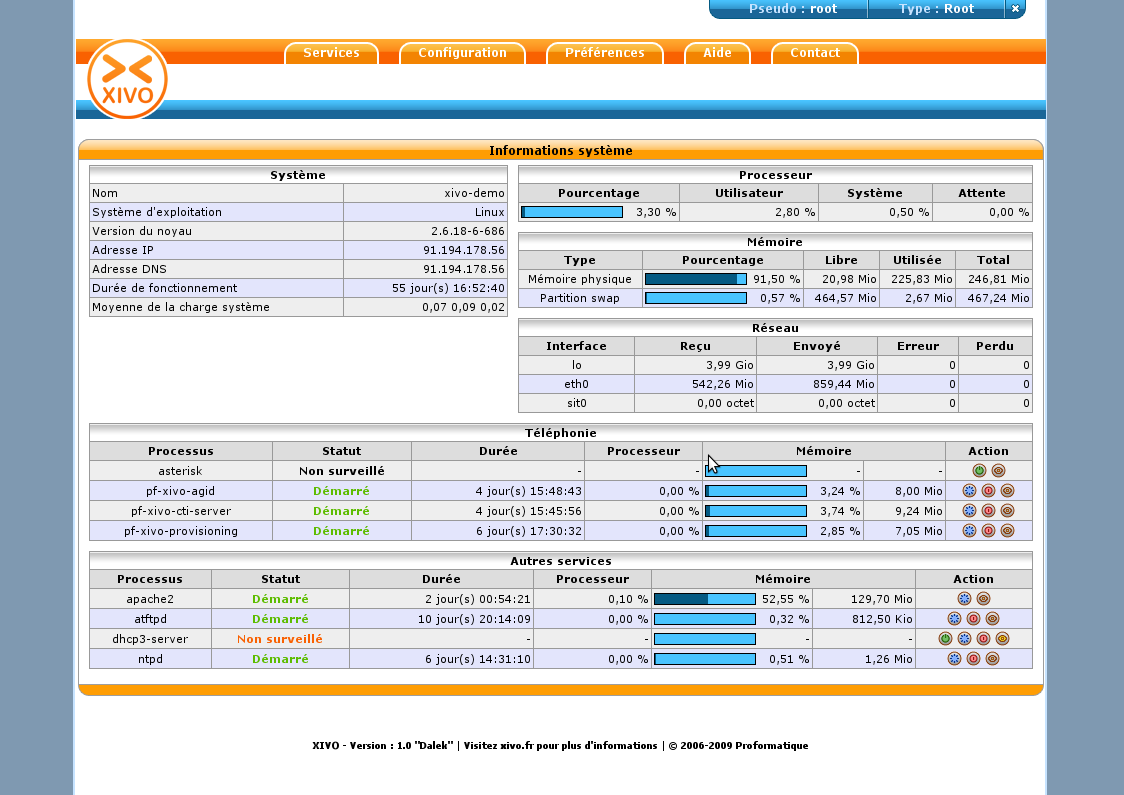 page d'accueil